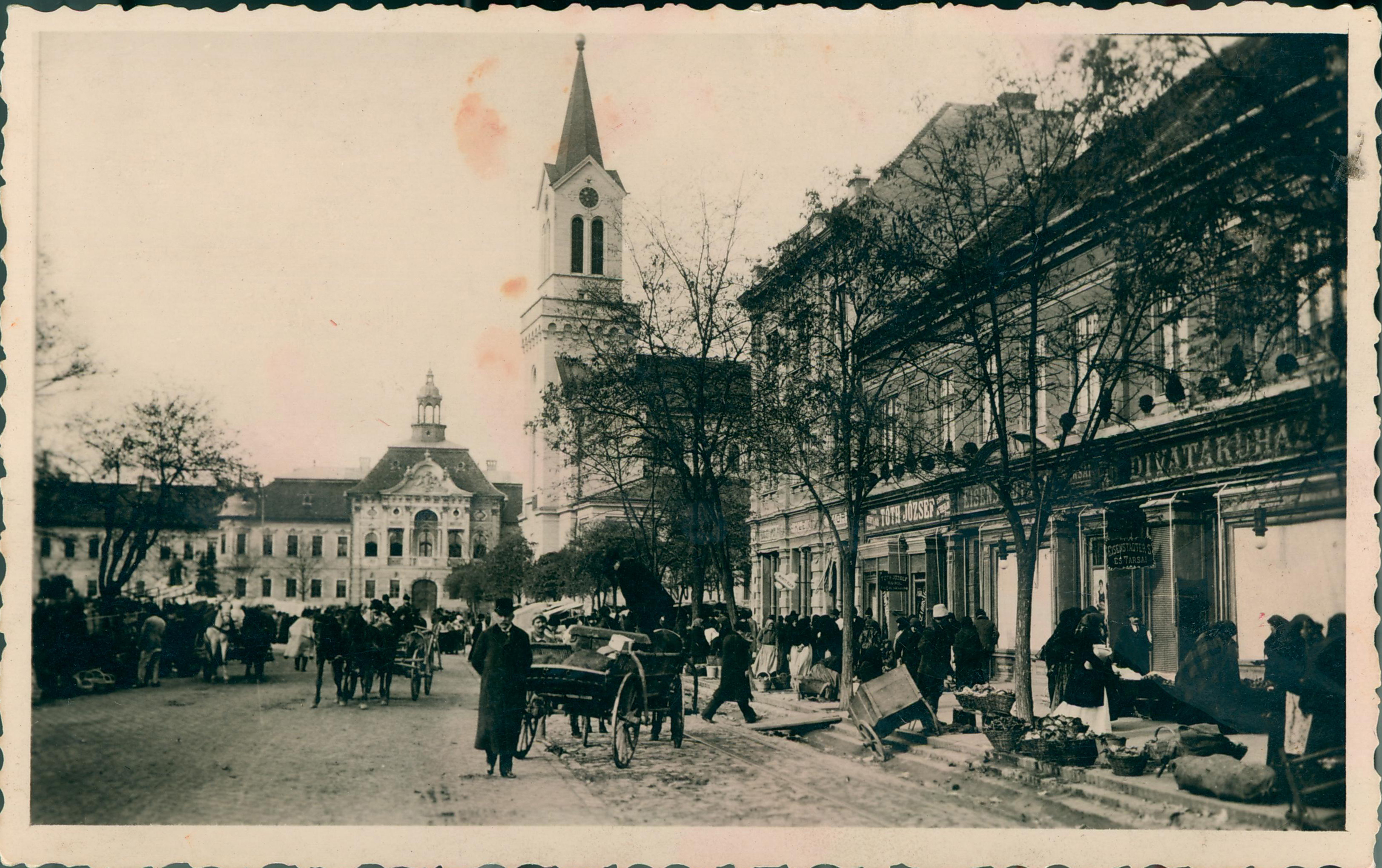 Пијаца у Главној улици у Великом Бечкереку, 1912. године, фото: Ђура Рокнић.